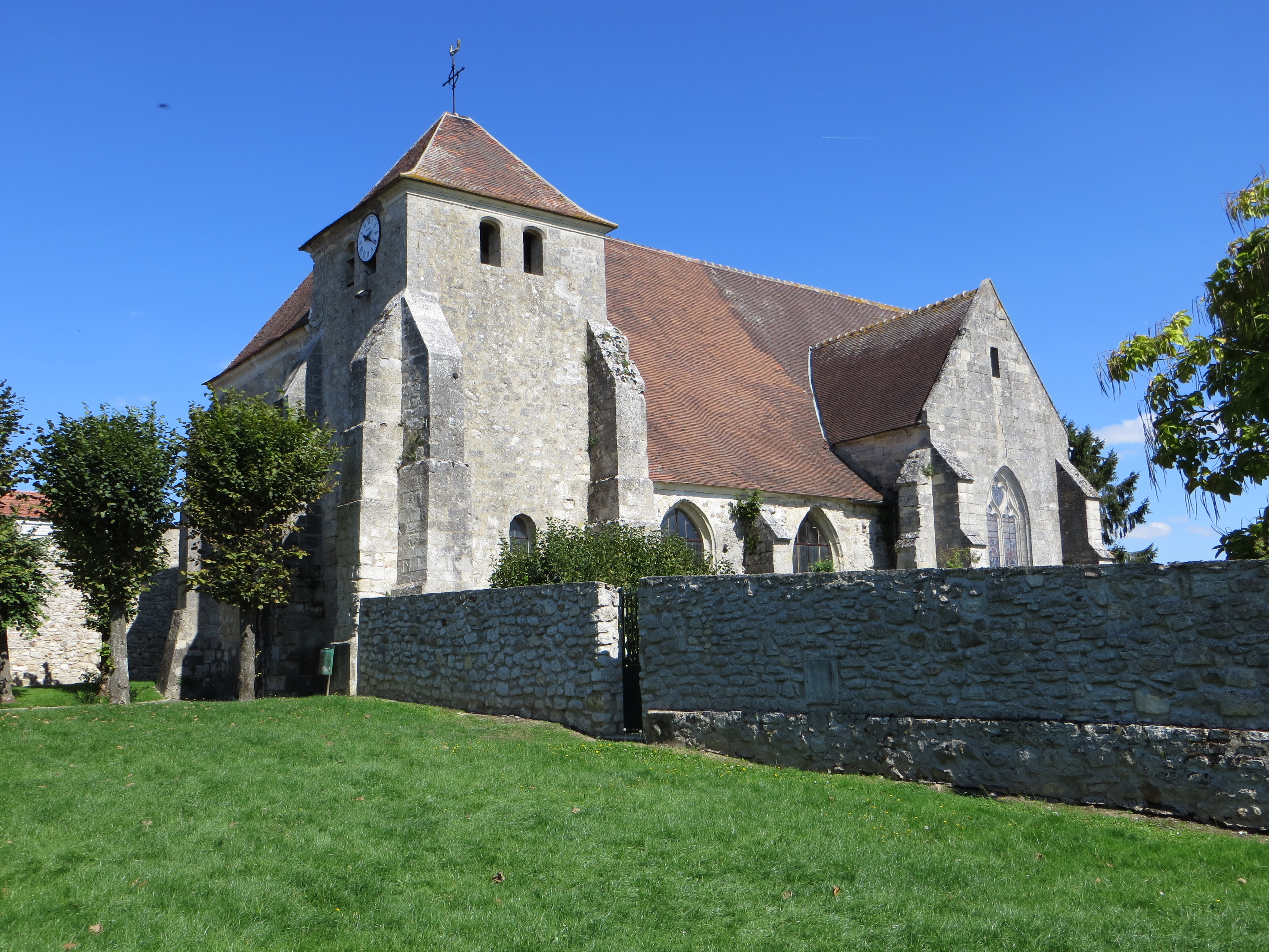 Vue générale de l'église